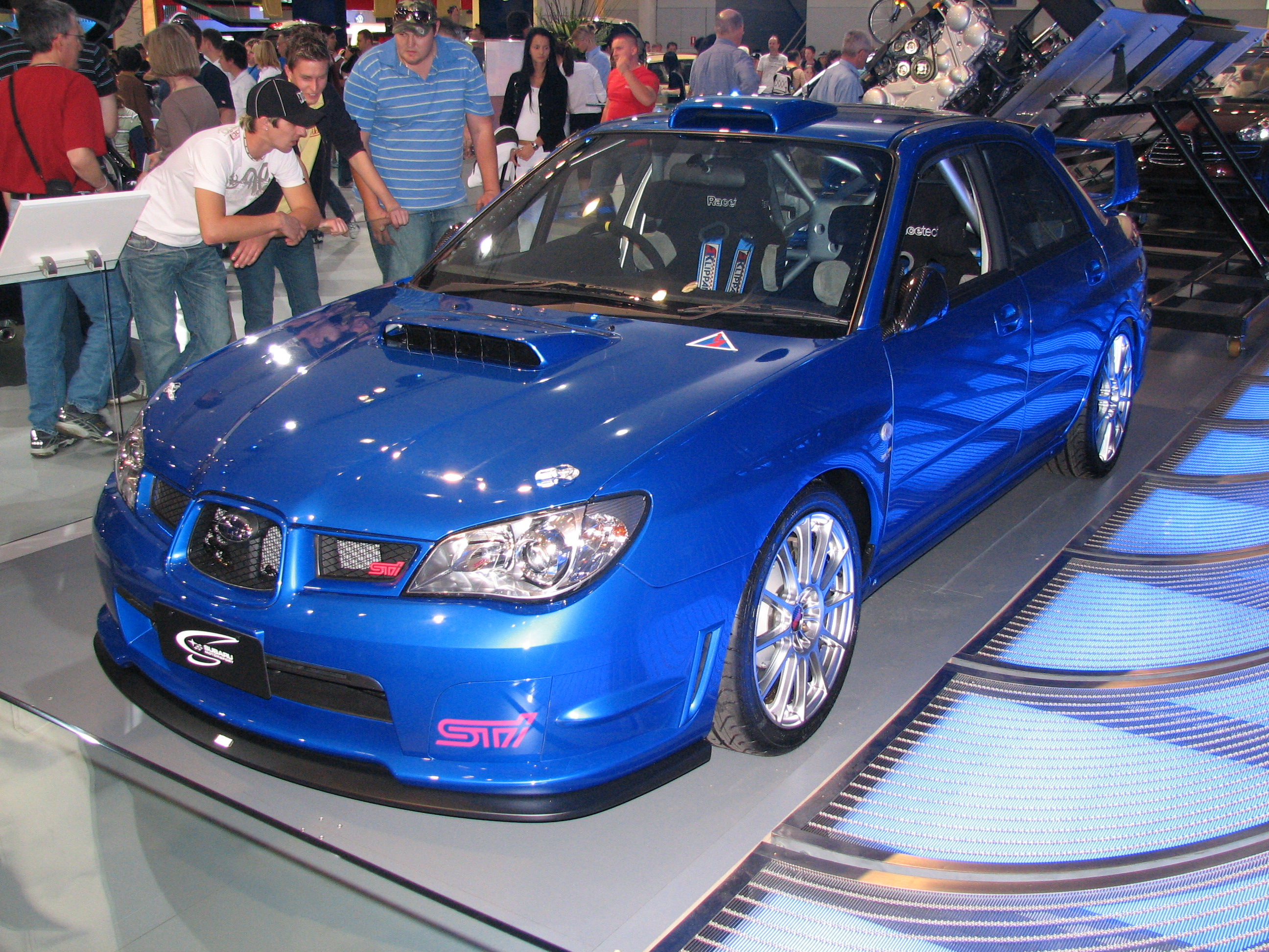 Subaru Impreza WRX STi